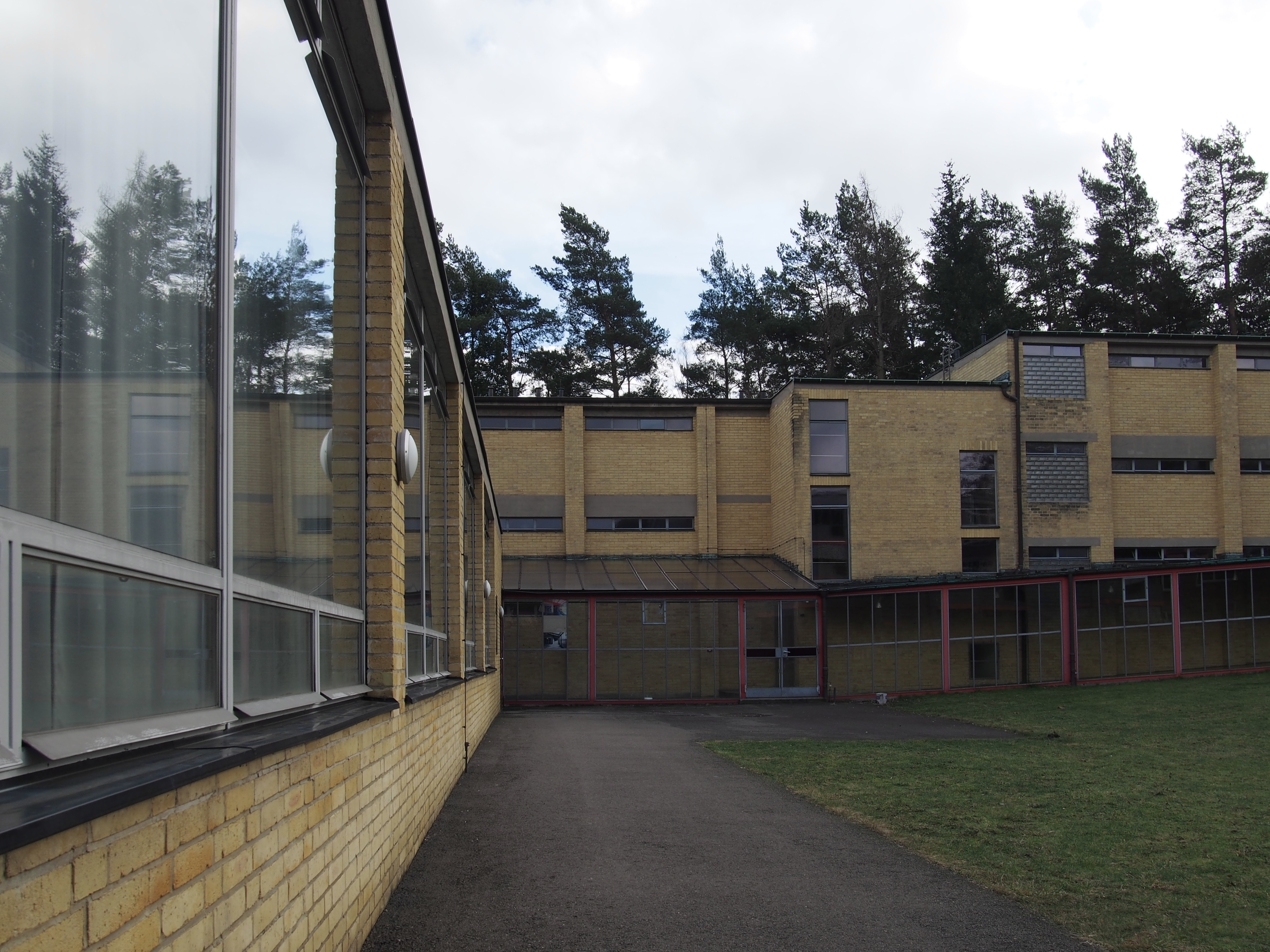 Das Bauhaus Denkmal Bundesschule Bernau wurde von der Kultusministerkonferenz am 1. Februar 2016 für die Aufnahme in die UNESCO-Liste des Welterbes zur Entscheidung im Jahr 2017 nominiert. Dabei handelt es sich um einen Antrag auf Erweiterung des schon bestehenden Welterbes der Bauhaus-Stätten Weimar und Dessau. Die Erweiterung umfasst neben der "Bundesschule des ADGB in Bernau bei Berlin" auch die "Laubenganghäuser in Dessau-Roßlau". Damit in Zusammenhang steht auch die Übergabe der Förderurkunde für "Premium Projekte" im Rahmen des Programms "Nationale Projekte des Städtebaus" durch die Bundesbauministerin Barbara Hendricks an die Stadt Bernau bei Berlin am 26. Januar 2016 in Berlin. Mit 1.2 Millionen Euro fördert das Bundesministerium die denkmalgerechte Umgestaltung und Sanierung der Außenanlagen im Denkmalbereich der Bundesschule. Weitere 600 000 Euro stellt die Stadt bereit. Bei der Neugestaltung geht es um die Zufahrtsituation von der Wandlitzer Chaussee über die Fritz-Heckert-Straße zum Hannes-Meyer-Campus; den Eingangsbereich zum Campus und den Campus selbst sowie den Außenraum links und rechts entlang der Internatsgebäude des Meyer-Wittwer-Baus. Dafür hatte der Verein baudenkmal bundesschule bernau vor zwei Jahren mit Unterstützung der Stiftung Baudenkmal Bundesschule Bernau eine Außenanlagenkonzeption (Masterplan) vorgelegt. Die Arbeiten werden sich über einen Zeitraum von etwa zwei Jahren erstrecken.